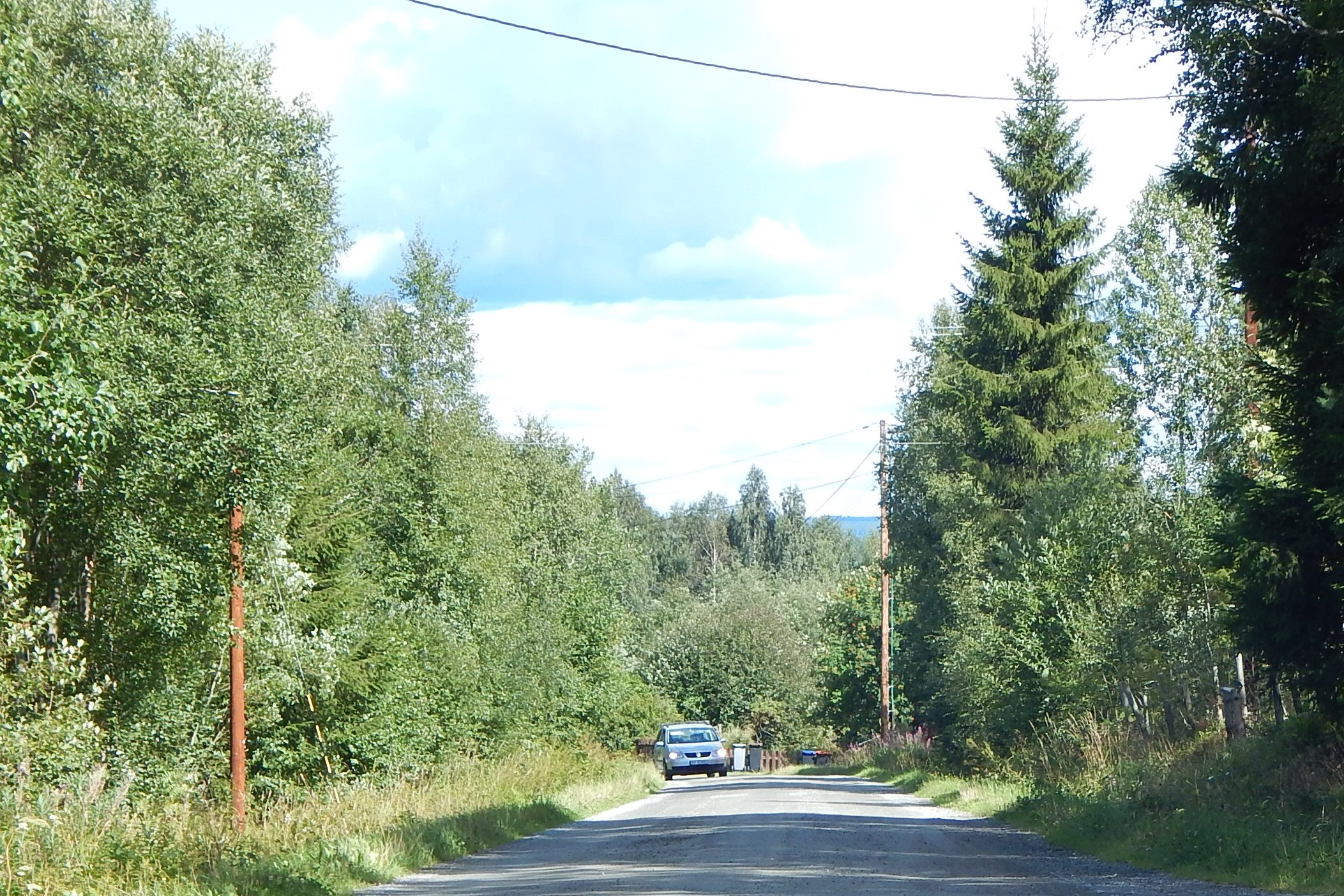 Sopelimkroken (fylkesvei 1850, tidl. 170) sett fra Åsvegen